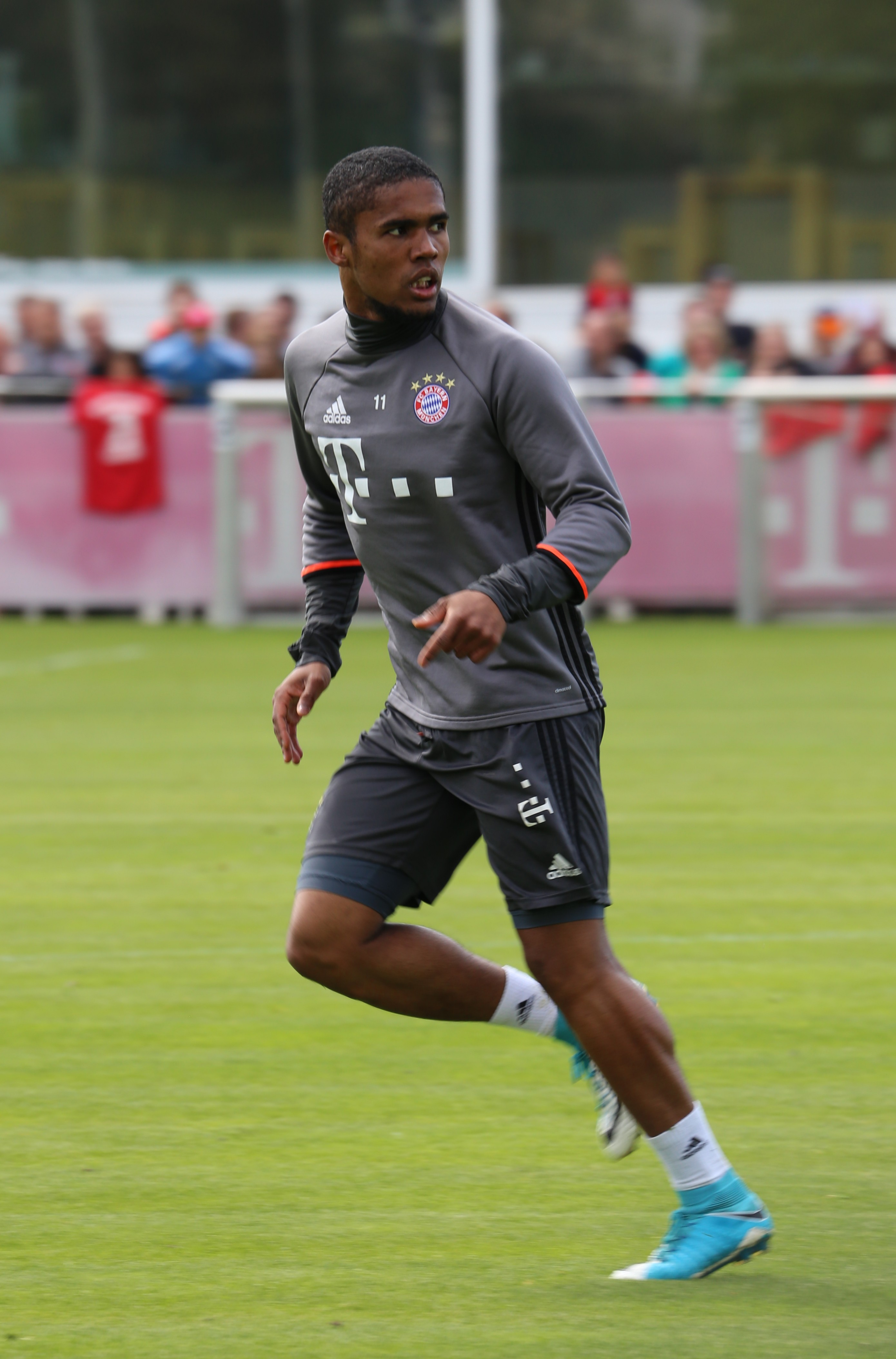 Douglas Costa, am 3. Mai 2017 beim Training auf dem Gelände des FC Bayern München